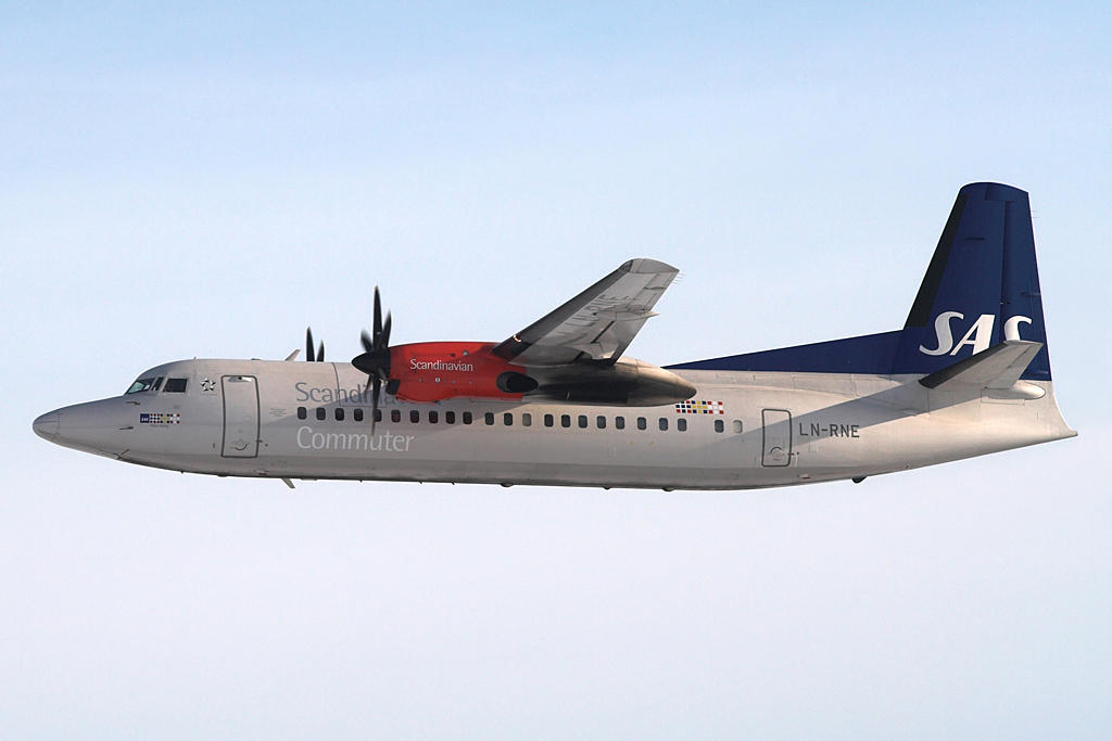 Fokker 50 tar av fra Gardermoen (Oslo, Norway)